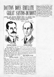 From 1903